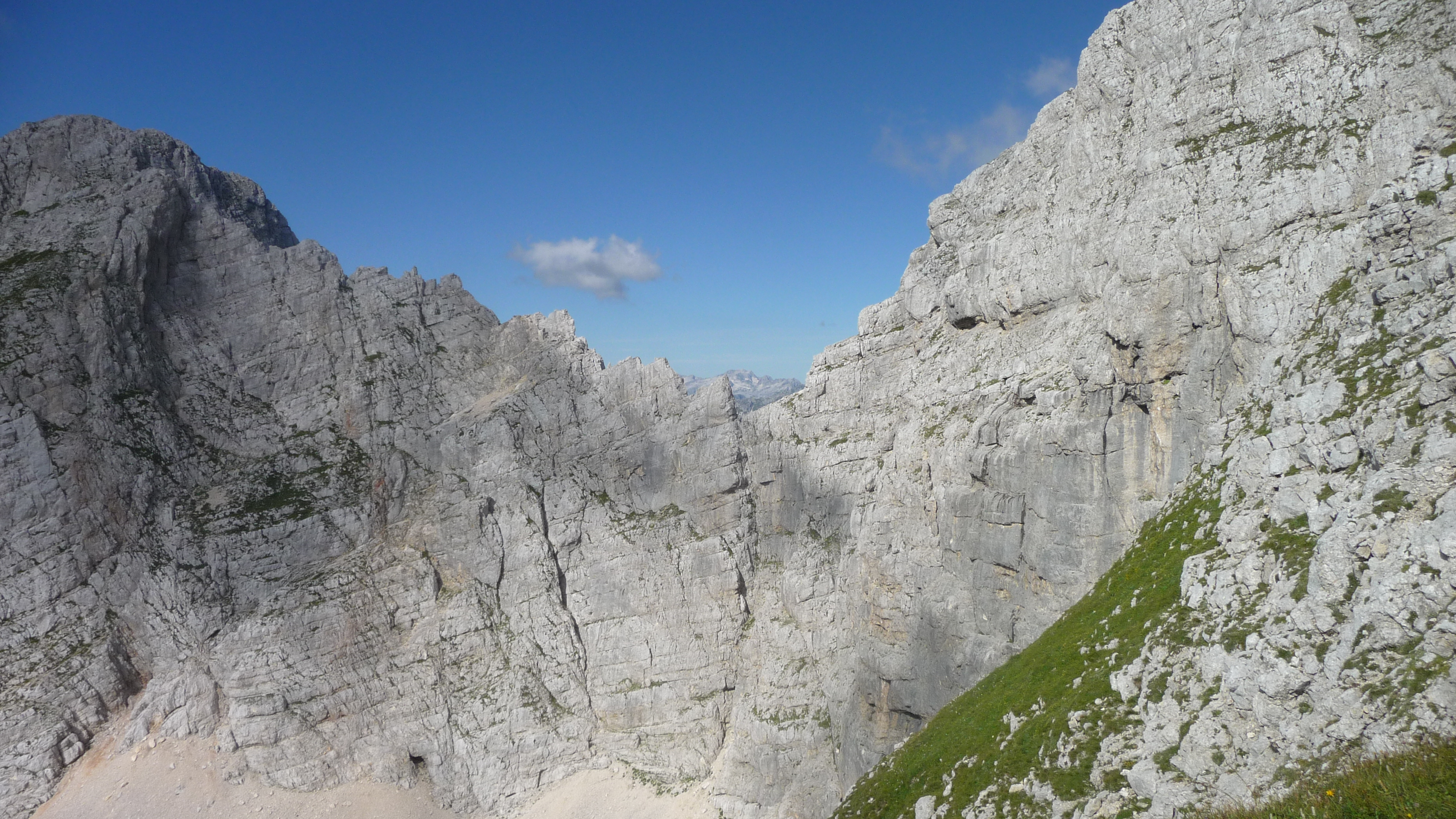 Kanin iz poti na Bovški Gamsovec